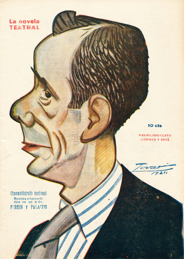 Caricatura de Maximiliano Clavo.